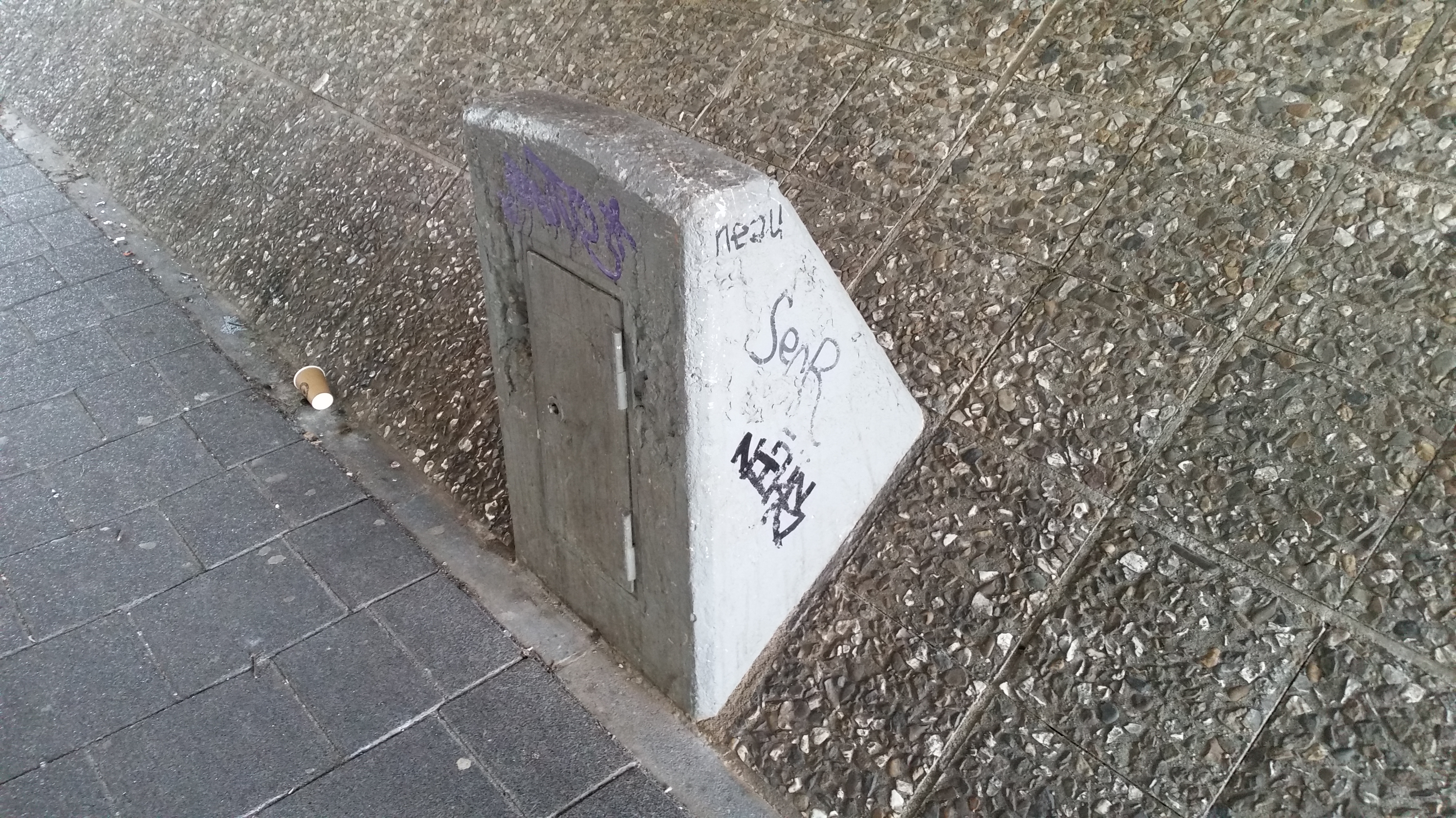 Impressie van brug 1039 in Amsterdam Zuidoost (juli 2020)